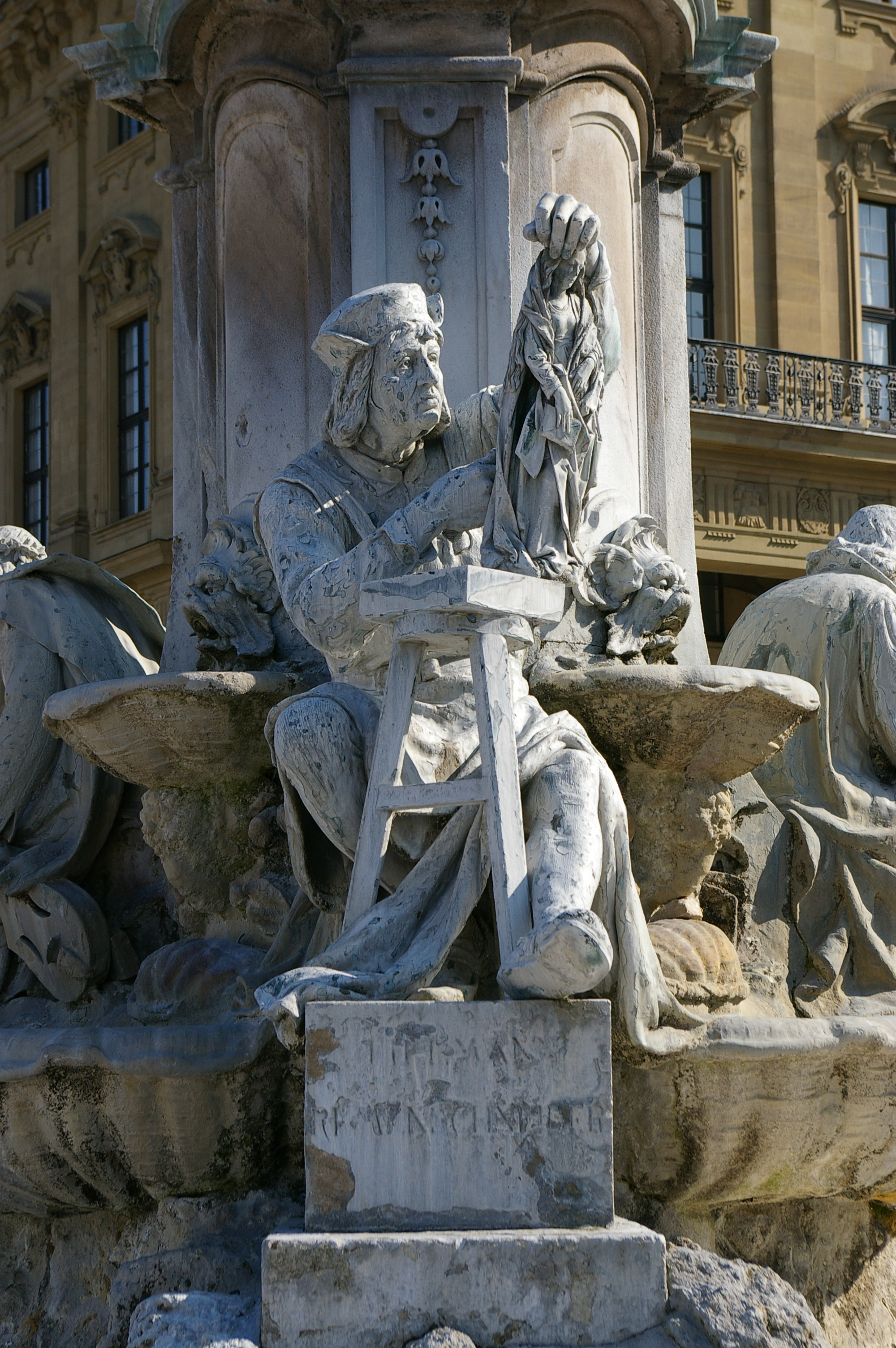 Frankoniabrunnen Würzburg - Figur des Tilman Riemenschneider